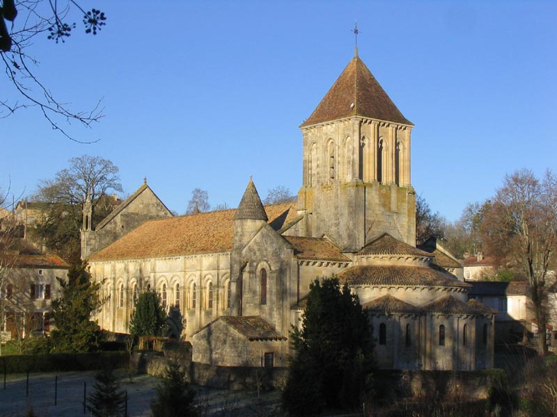 Église de Saint Hilaire à Melle (Deux-Sèvres) en France. Elle fut construite en deux étapes : vers 1090, et vers 1150. L'église Saint-Hilaire est classée au patrimoine mondial de l'UNESCO depuis 1998.